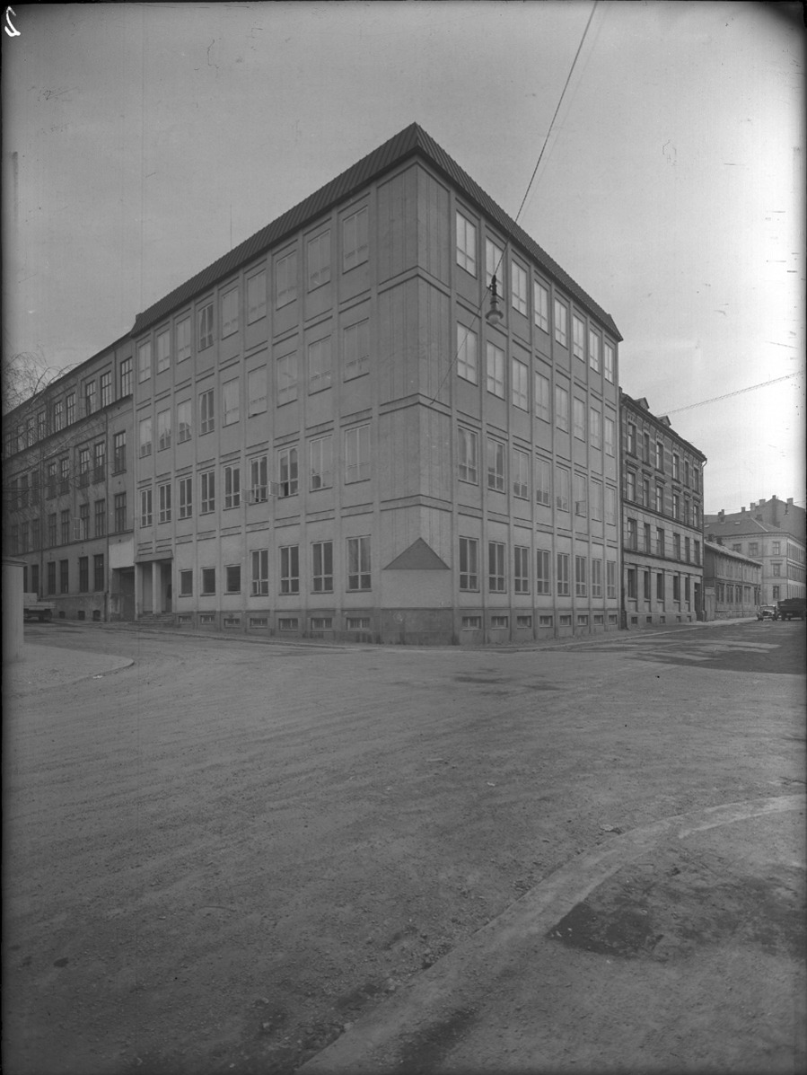 Oslo bånd- og lissefabrikk, bygårder, fabrikkbygninger bygårder. Avbildet: Norge (sted) Oslo (sted) Rodeløkka (sted) (Tidl. Oslo Baand, - og Lidsefabrikk) (sted) Teglverksgata 7 (sted), Gøteborggata